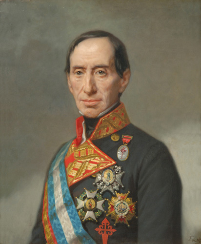 Teniente General José Manuel de Goyeneche y Barreda. Primer Conde de Guaqui. Cuadro de Federico de Madrazo.